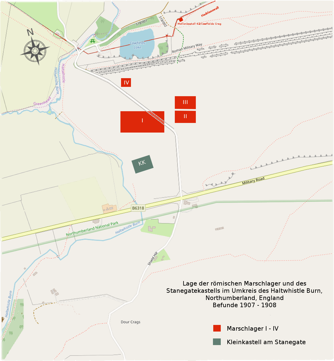 Lage der römischen Marschlager und des Kleinkastells am Stanegate im Umkreis des Haltwhistle Burn (Northumberland,GB), Befunde 1907 - 1908.